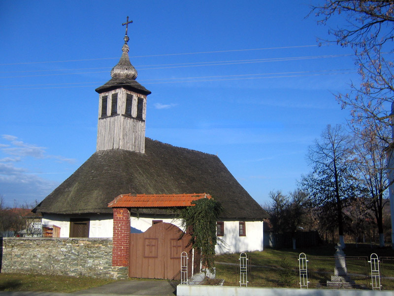 Categorie:Imagini din Banat